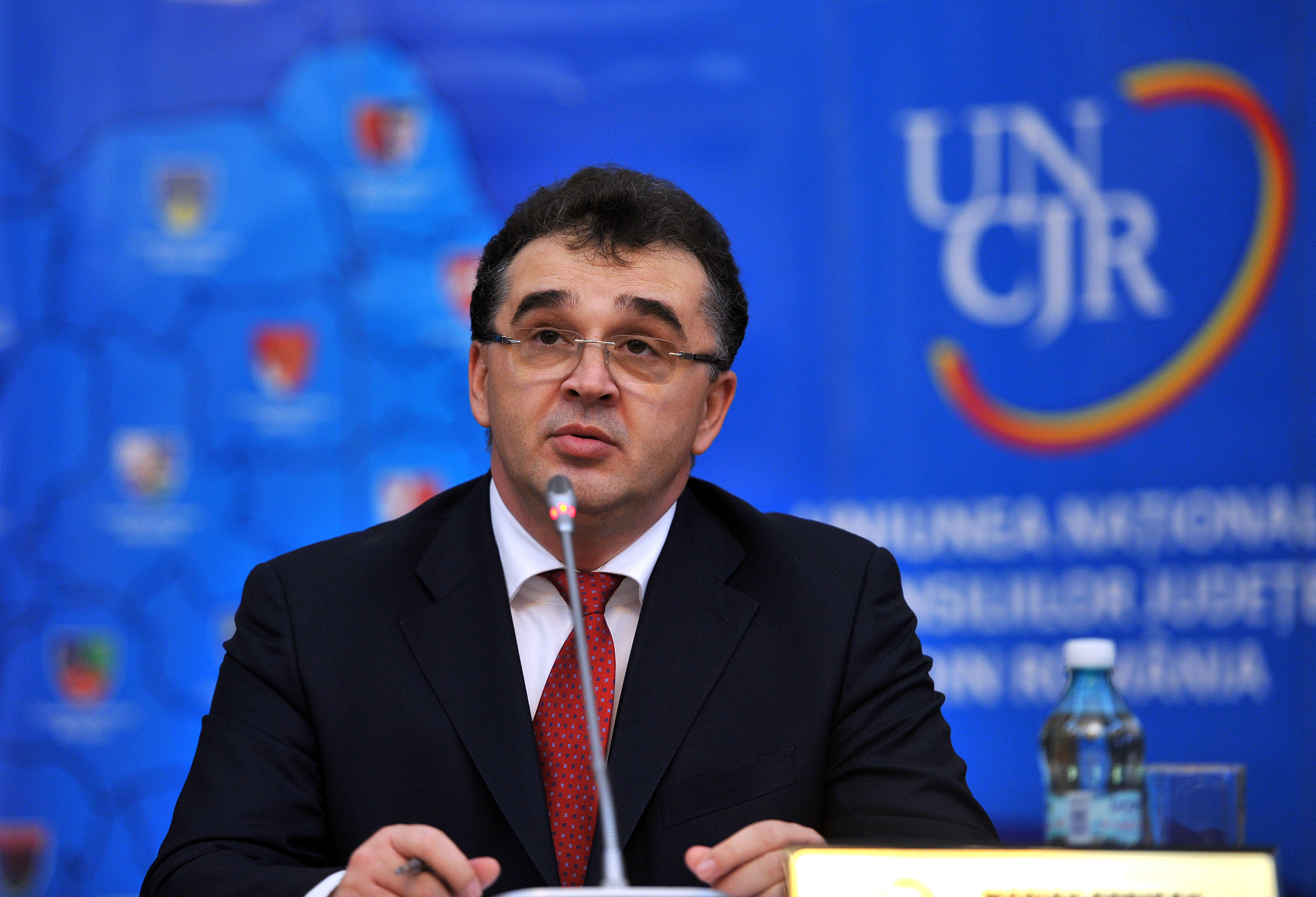 Marian Oprisan la Adunarea Generala a UNCJR, Palatul Parlamentului - 03.12.2013